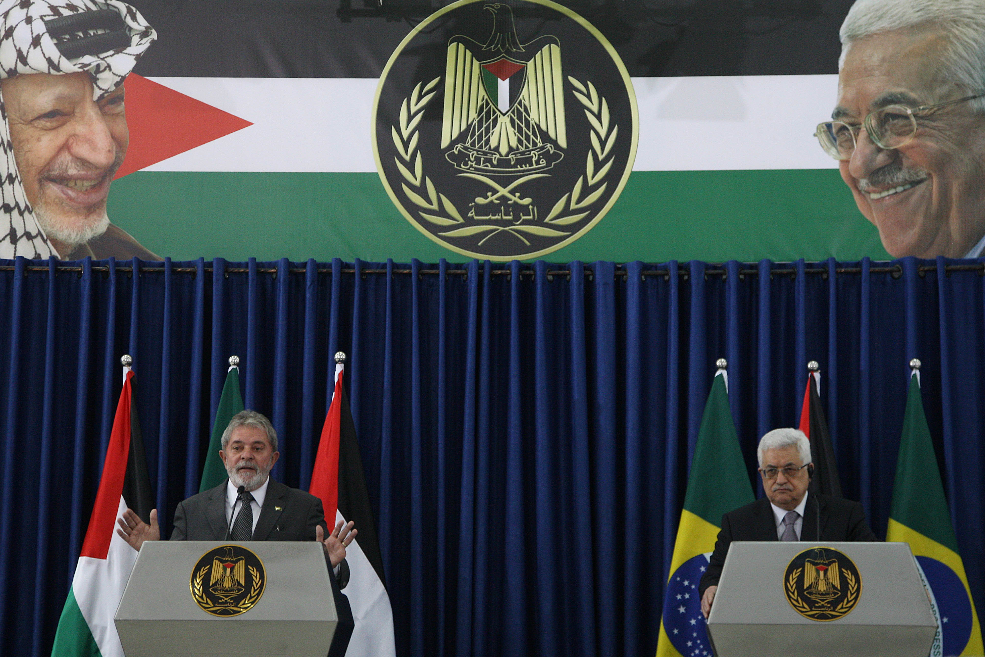 Ramalá, Cisjordânia - Presidente Lula e o presidente da Autoridade Nacional Palestina, Mahmoud Abbas, durante declaração à imprensa